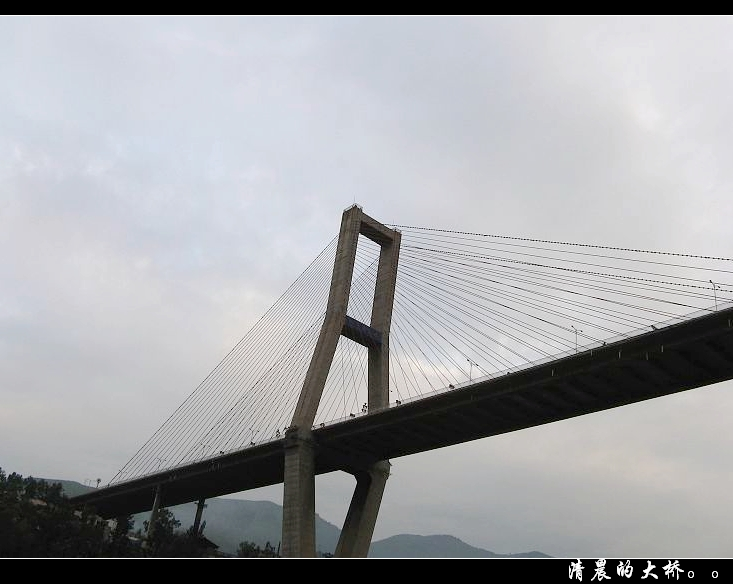 炳草岗大桥，在行驶的TAXI里拍的